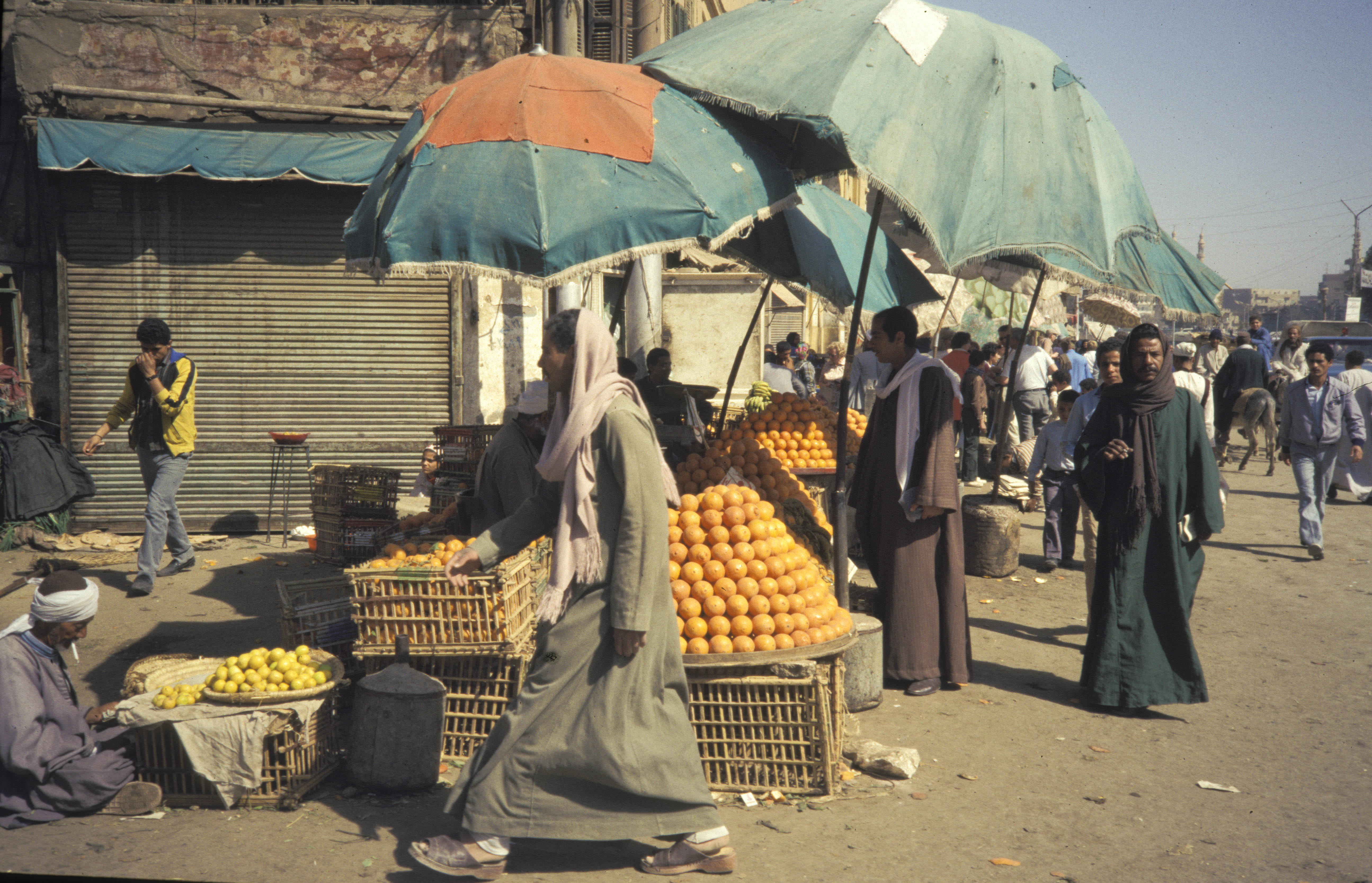 Egypt